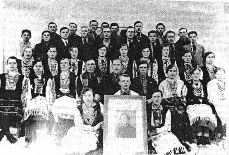 Хор «Просвіти»